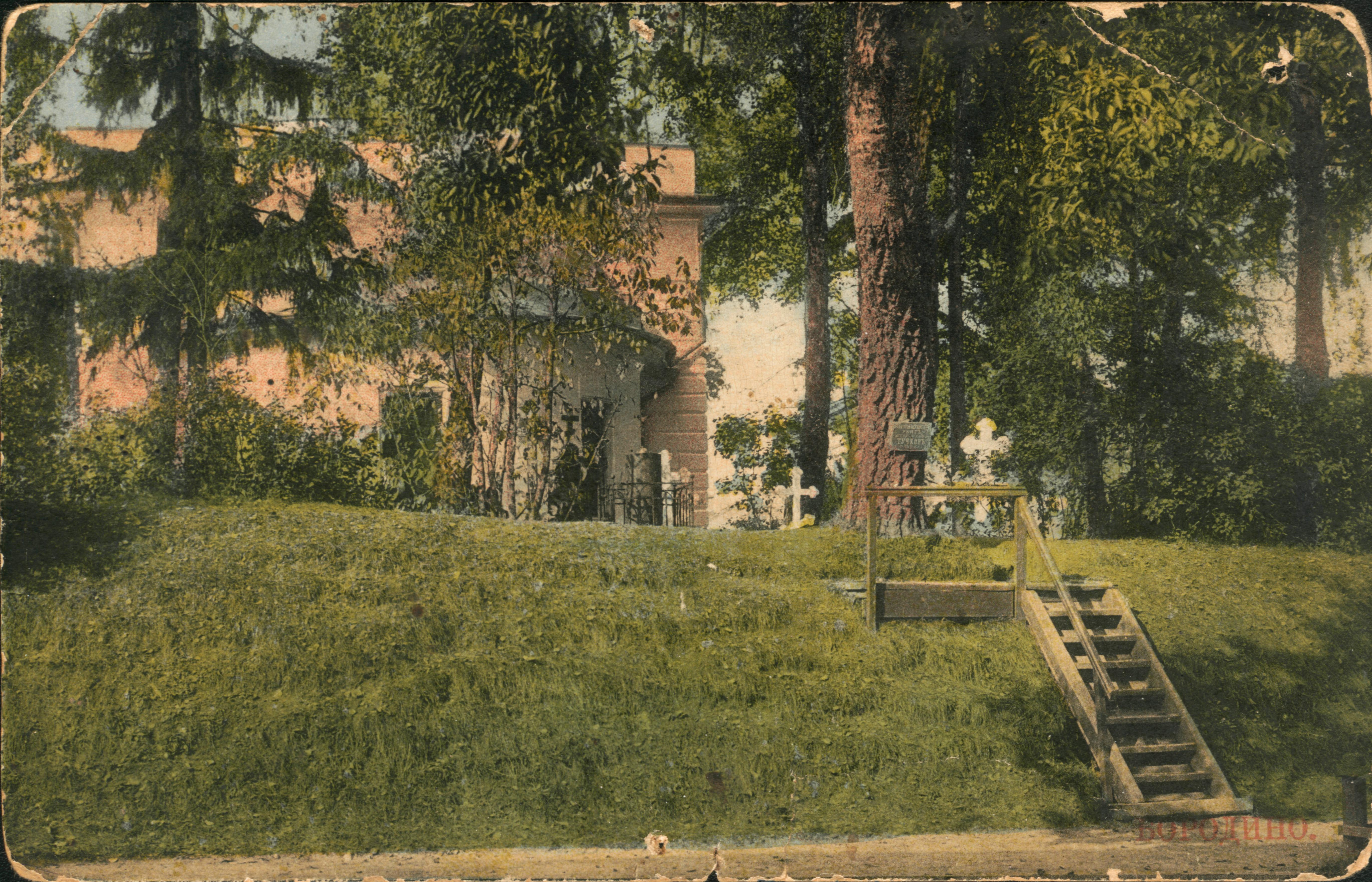 Цветная почтовая карточка (вся по-русски; Adresse и адрес типографии в Москве по-французски) Российской Империи (дословно): Видъ Семеновской флейши, на которой убитъ Генералъ-Маiоръ А. А. Тучковъ 26 Августа 1812 въ сраженiи при Бородине. Репродукцiя воспрещается. 1912 г. Изд. Спасcо-Бородинскаго монастыря.